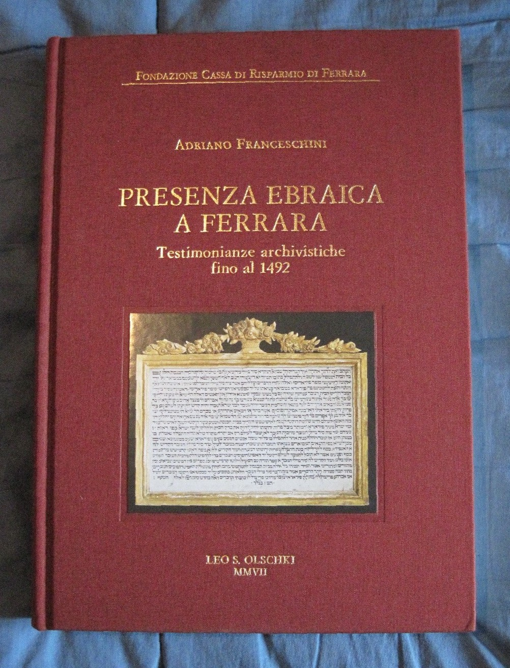 Adriano Franceschini - Opera pubblicata postuma